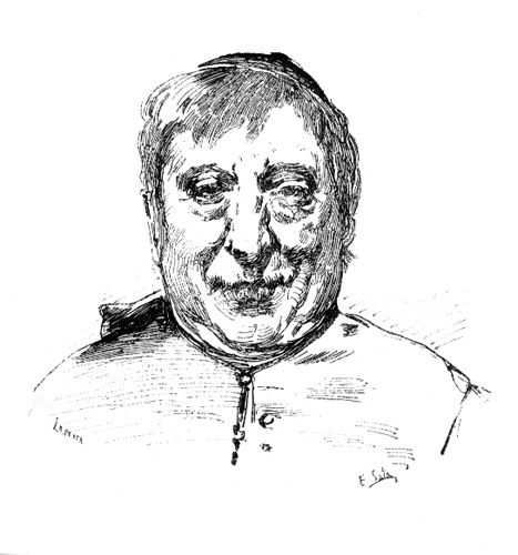 Ilustración del personaje de Blas de Ostolaza realizada por Emilio Sala para el episodio nacional "Memorias de un cortesano de 1815" (Imp. de J. Noguera, 1875)